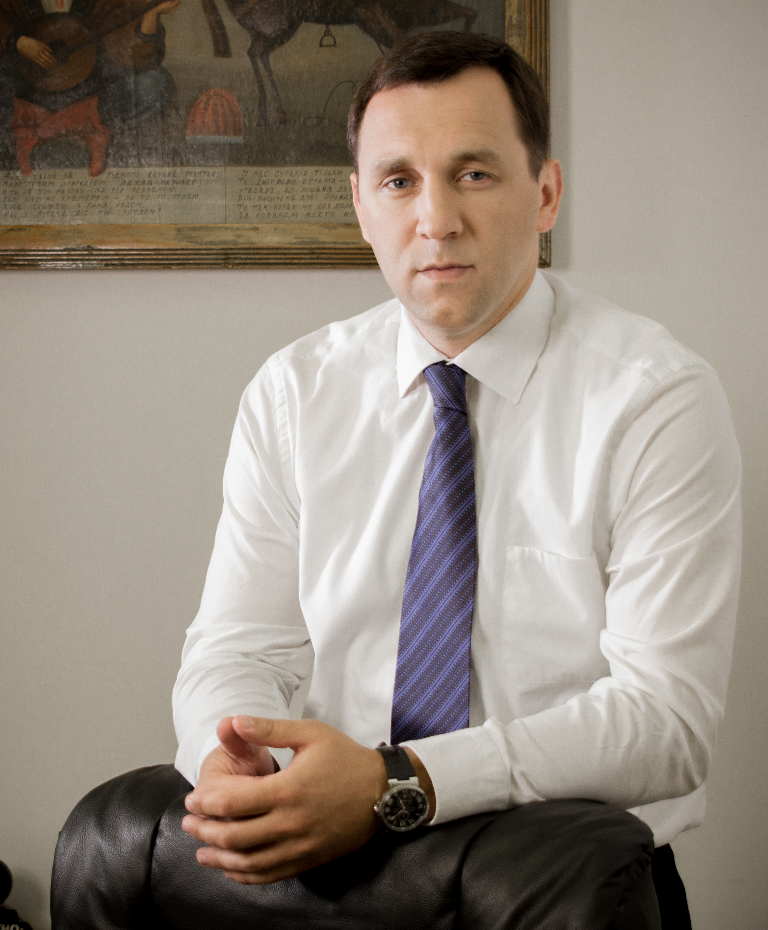 Кривенко Віктор Миколайович